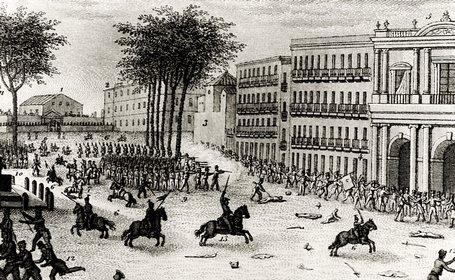 Bullanga (revuelta popular) de Barcelona, 1837.